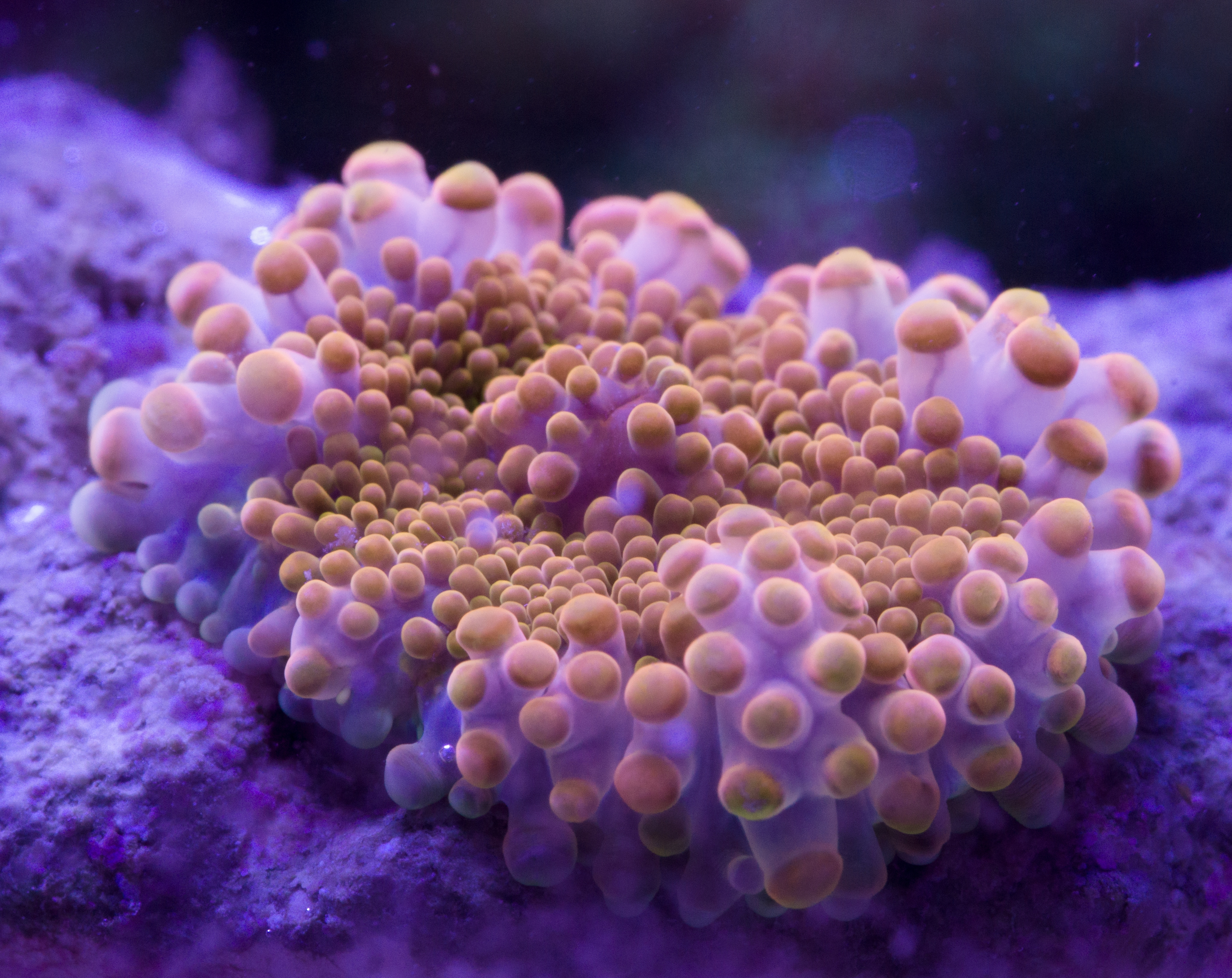 Ricordea florida, tonalidad naranja, en acuario